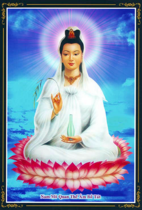 Représentation vietnamienne du boddhisattva de forme féminine Guanyin (Chine), Kannon (Japon).Autres désignations en vietnamien: Quán Thế Âm, ou Quán Thế Âm Bồ Tát.